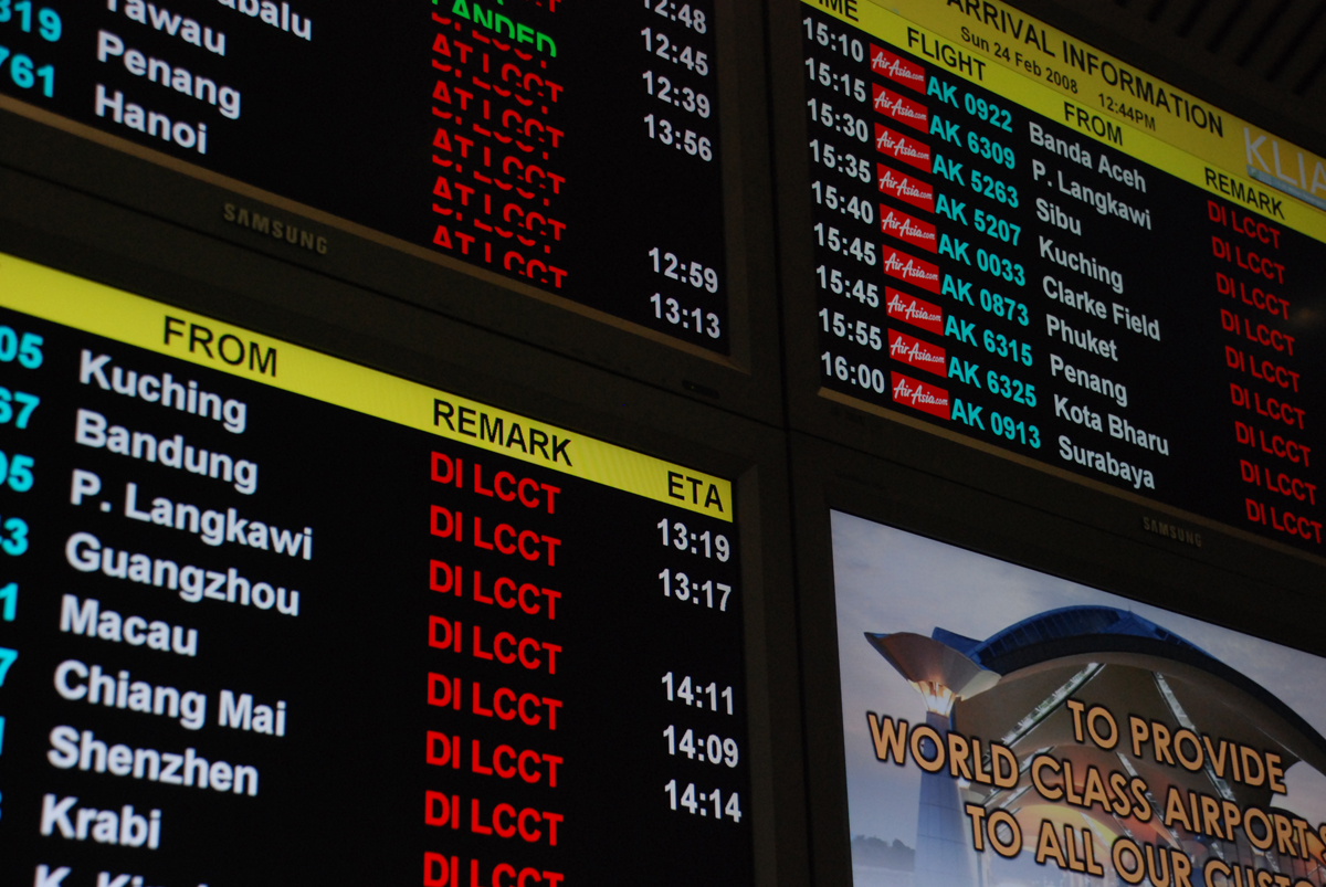 FID